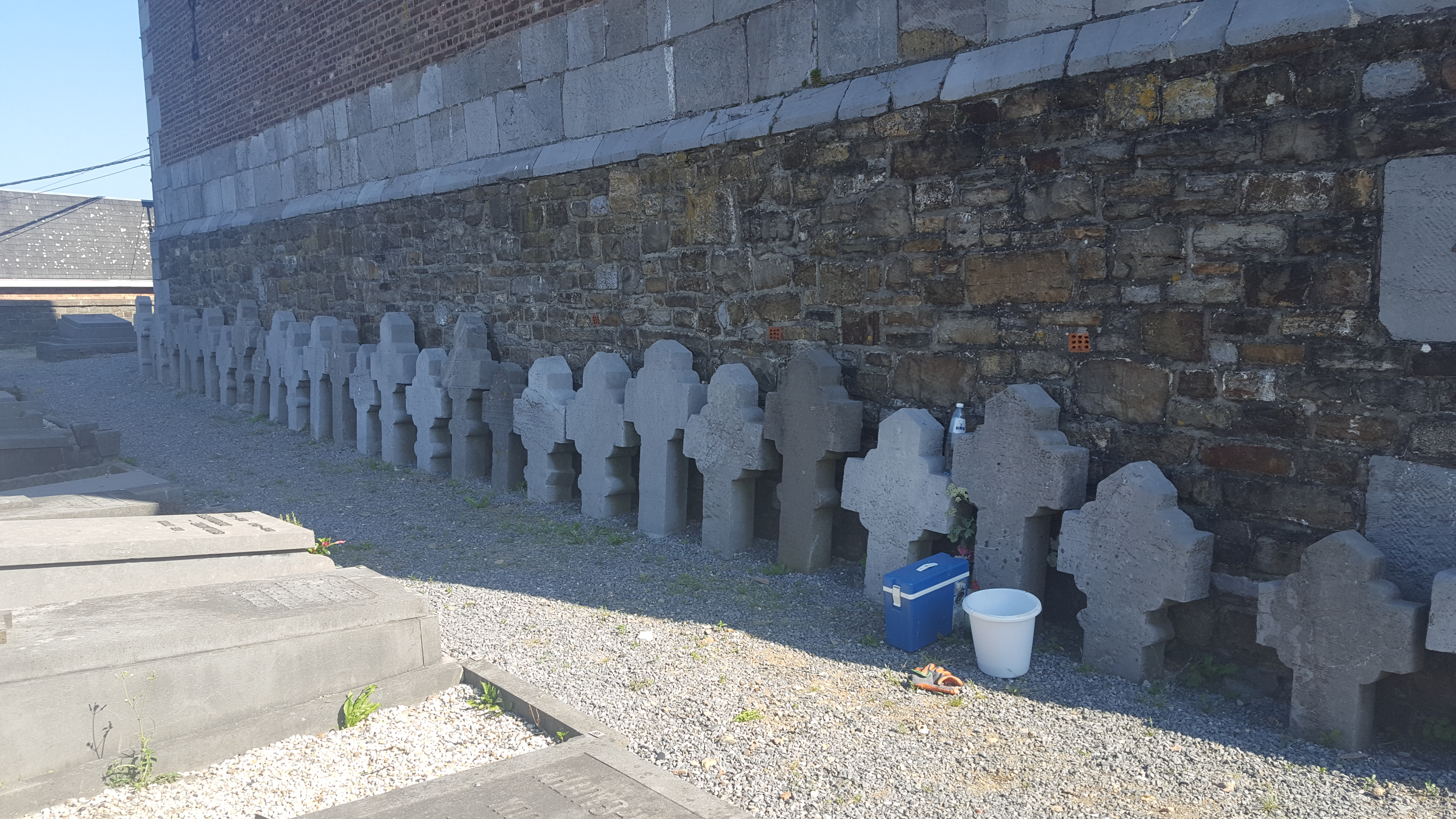 Église Saint-Jacques-le-Majeur, Thimister-Clermont, Belgique